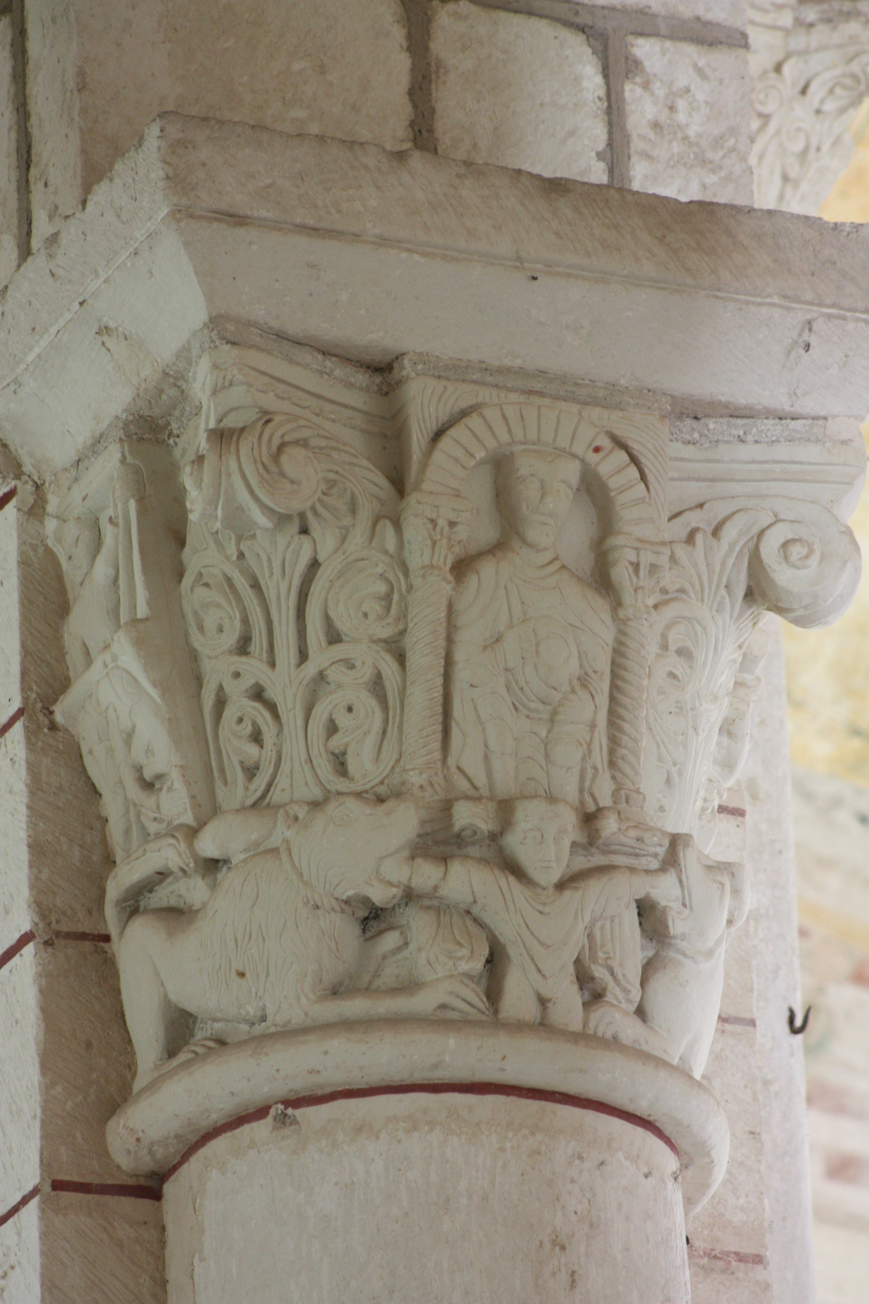 Méobecq - Eglise abbatiale Saint-Pierre Chapiteau